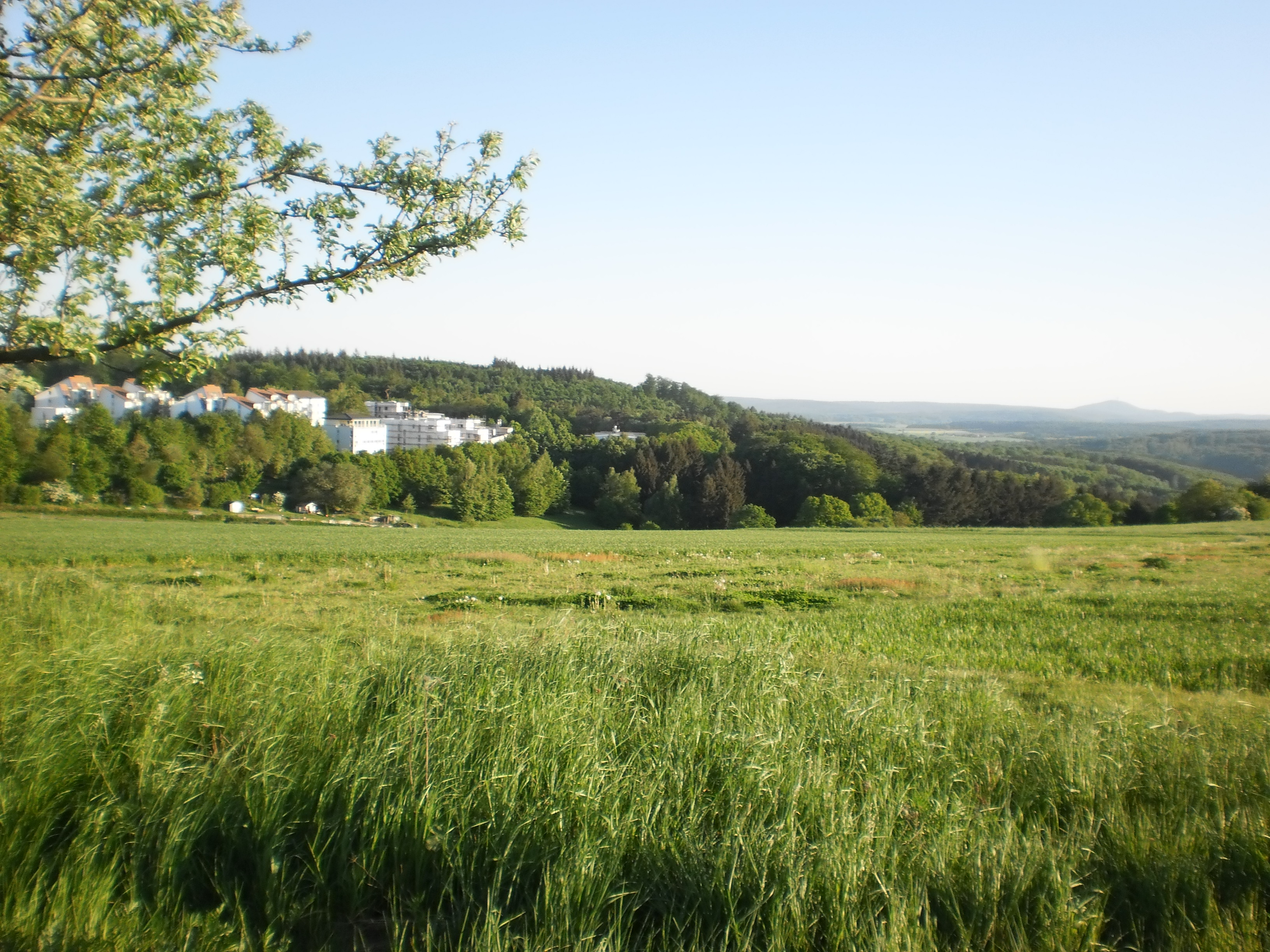 Blühende Wiese im Frühjahr (2018 in Hessen) und Äcker am Hasenkopf mit Blick auf die weissen Häuser von Marburg-Stadtwald links im Wald und weiter in die Ferne zum Dünsberg. Das kleine tief eingeschnittene Tal gehört schon zur Elnhausen-Michelbacher Senke bei Cyriaxweimar. 2018-05-07.